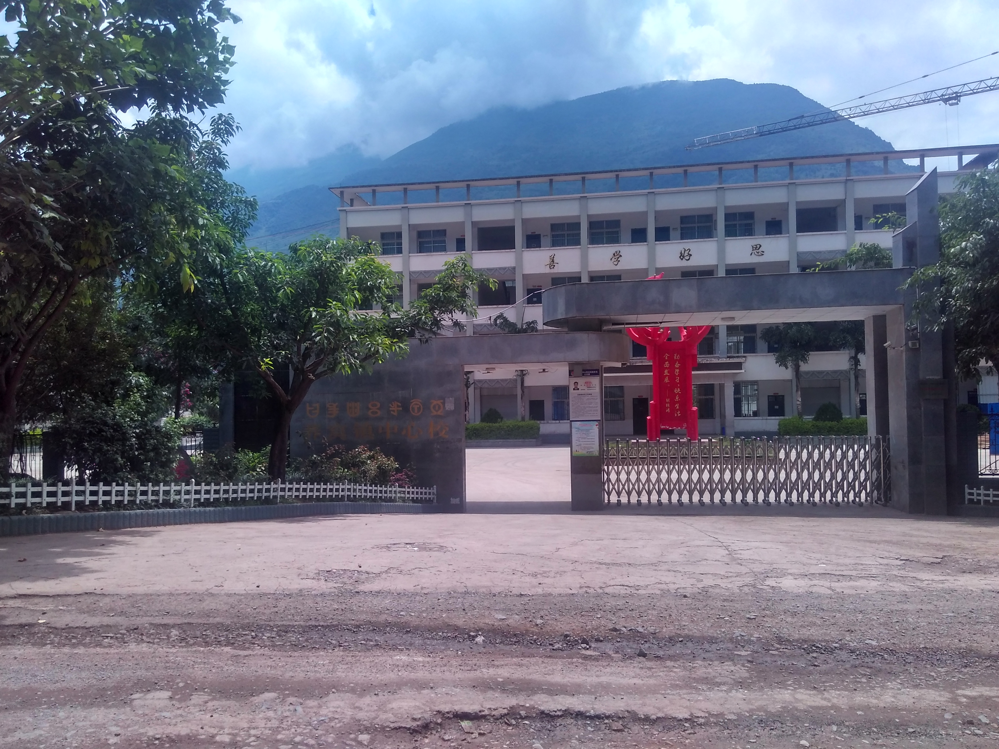 荞窝镇机构